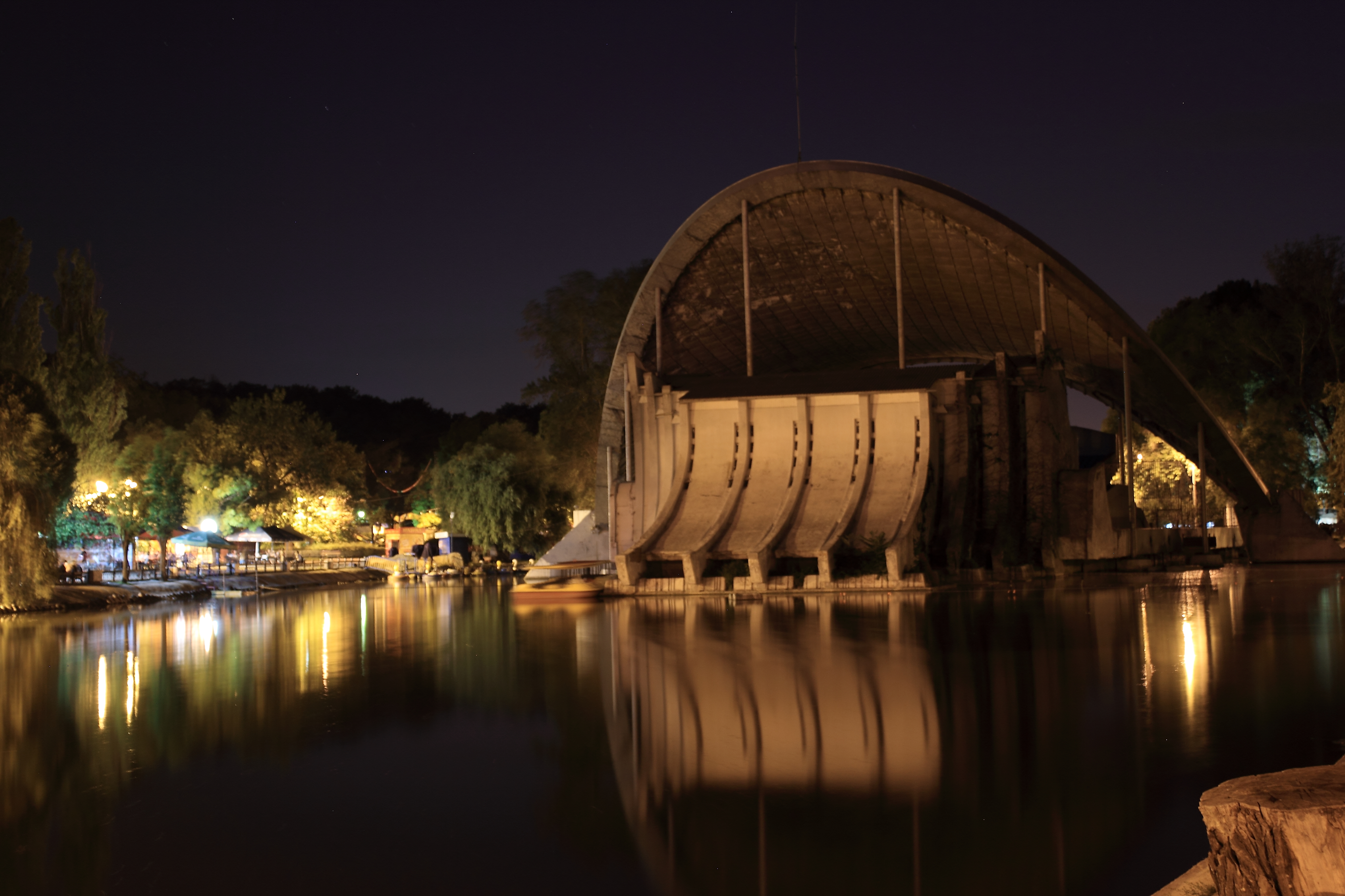 Парк ім. Чкалова, м. Дніпропетровськ, Пр. Карла Маркса,96